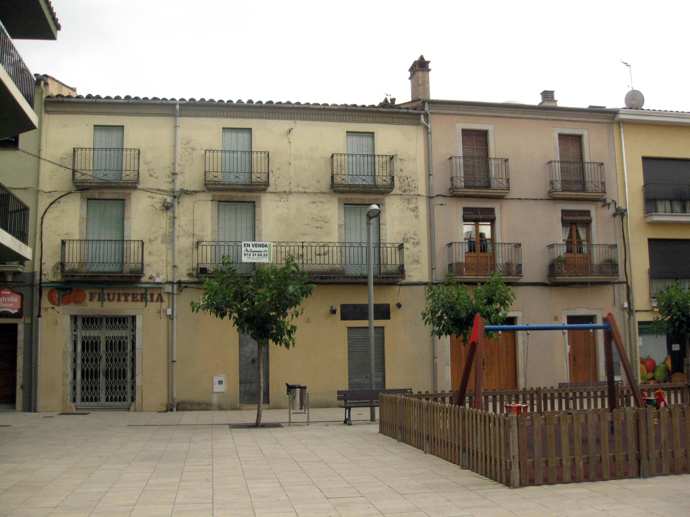 Plaça Nova i travessies (Vilobí d'Onyar)